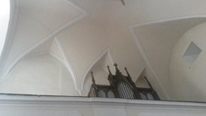 pohľad na strieľňu